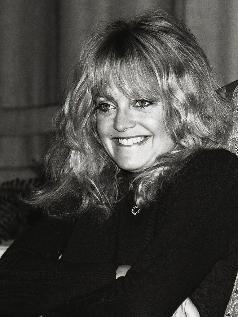 Goldie Hawn in Sweden